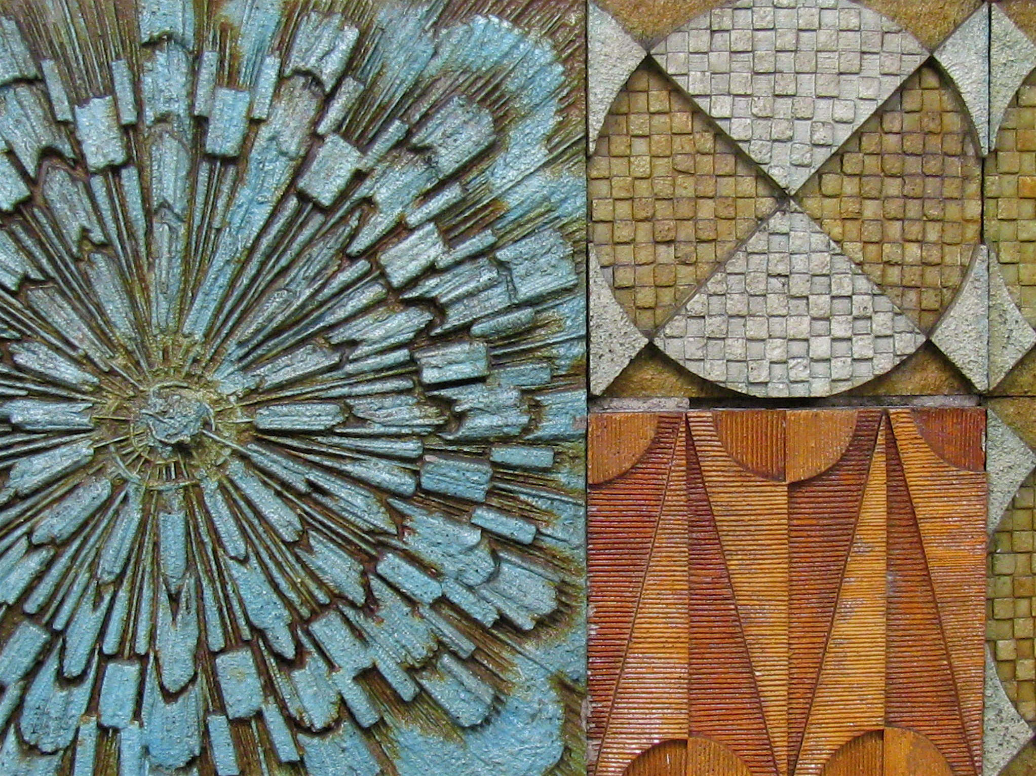 wow